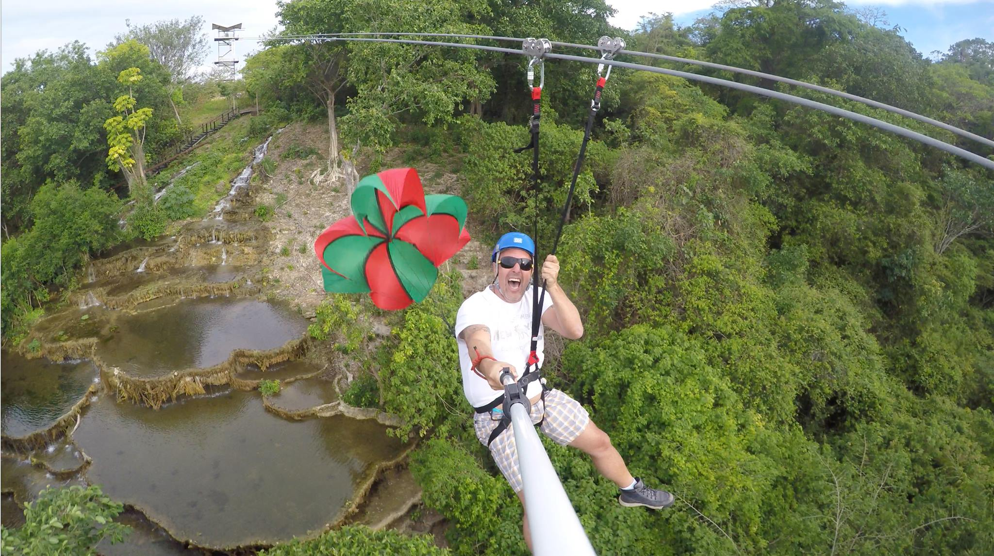 maior tirolesa do estado mato grosso do sul